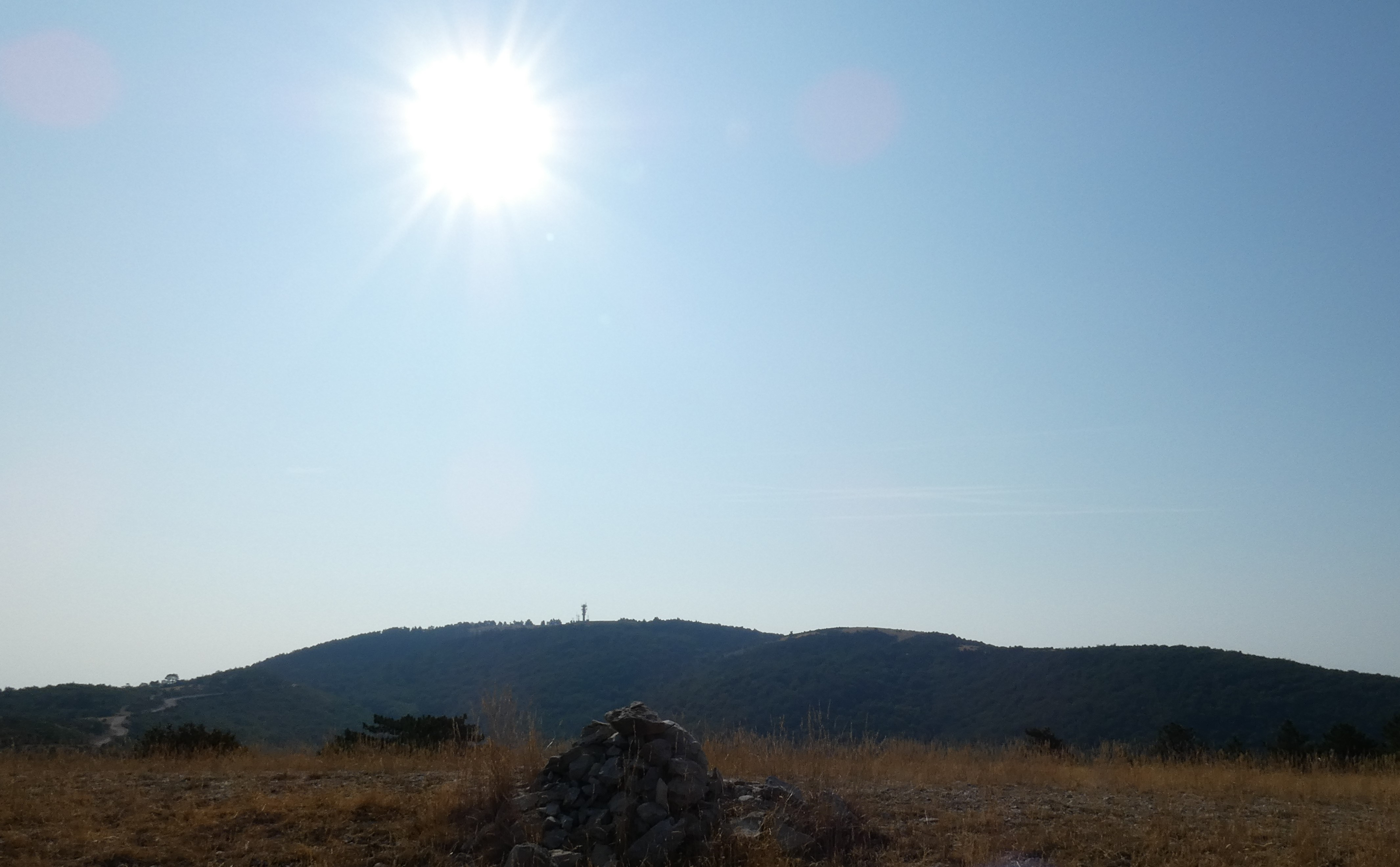 Vue sur le Mourre Nègre sommet du Luberon à 1125m d'altitude depuis les Estrugets